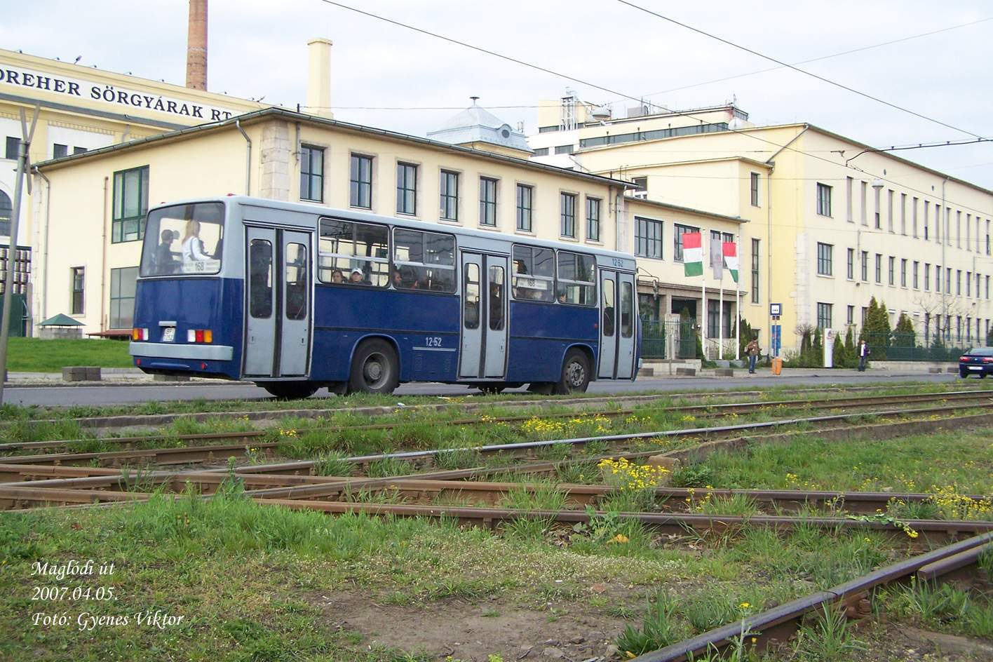 168-as jelzésű Ikarus 260-as busz a Dreher Sörgyár előtt